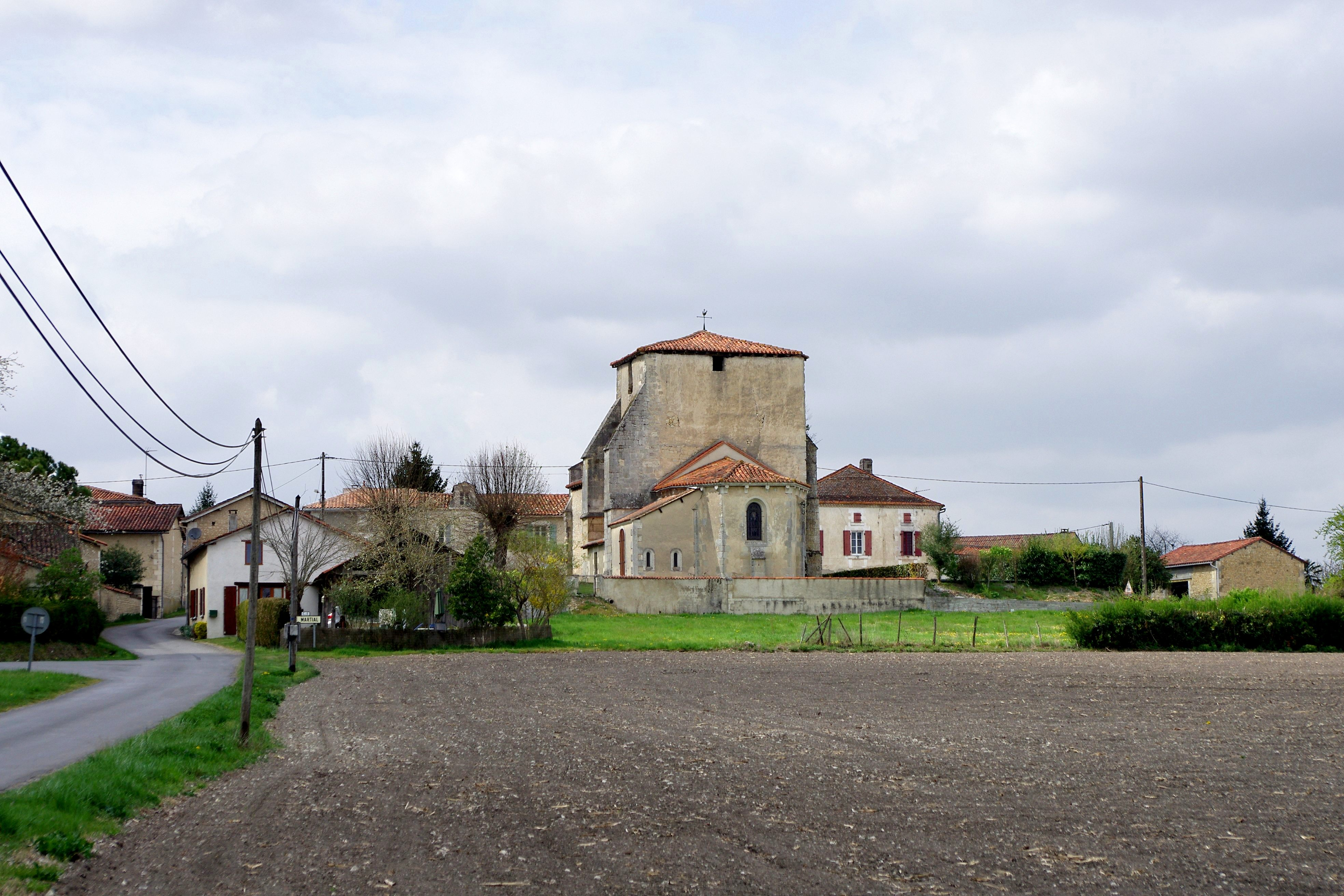 L'entrée sud-est du bourg et l'église de Saint-Martial, Charente, France.